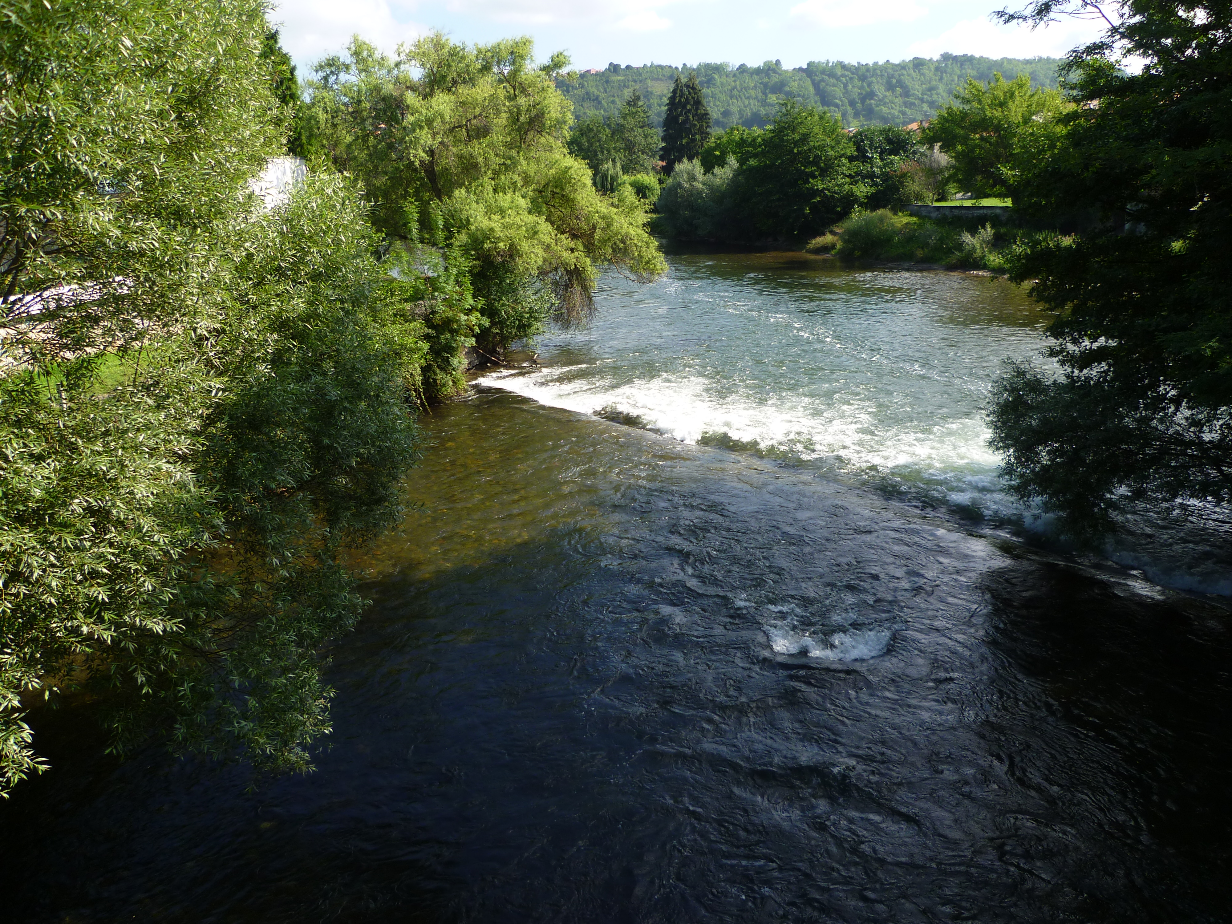 Saint-Girons (Ariège, Midi-Pyrénées, France) : Confluent du Lez et du Salat.